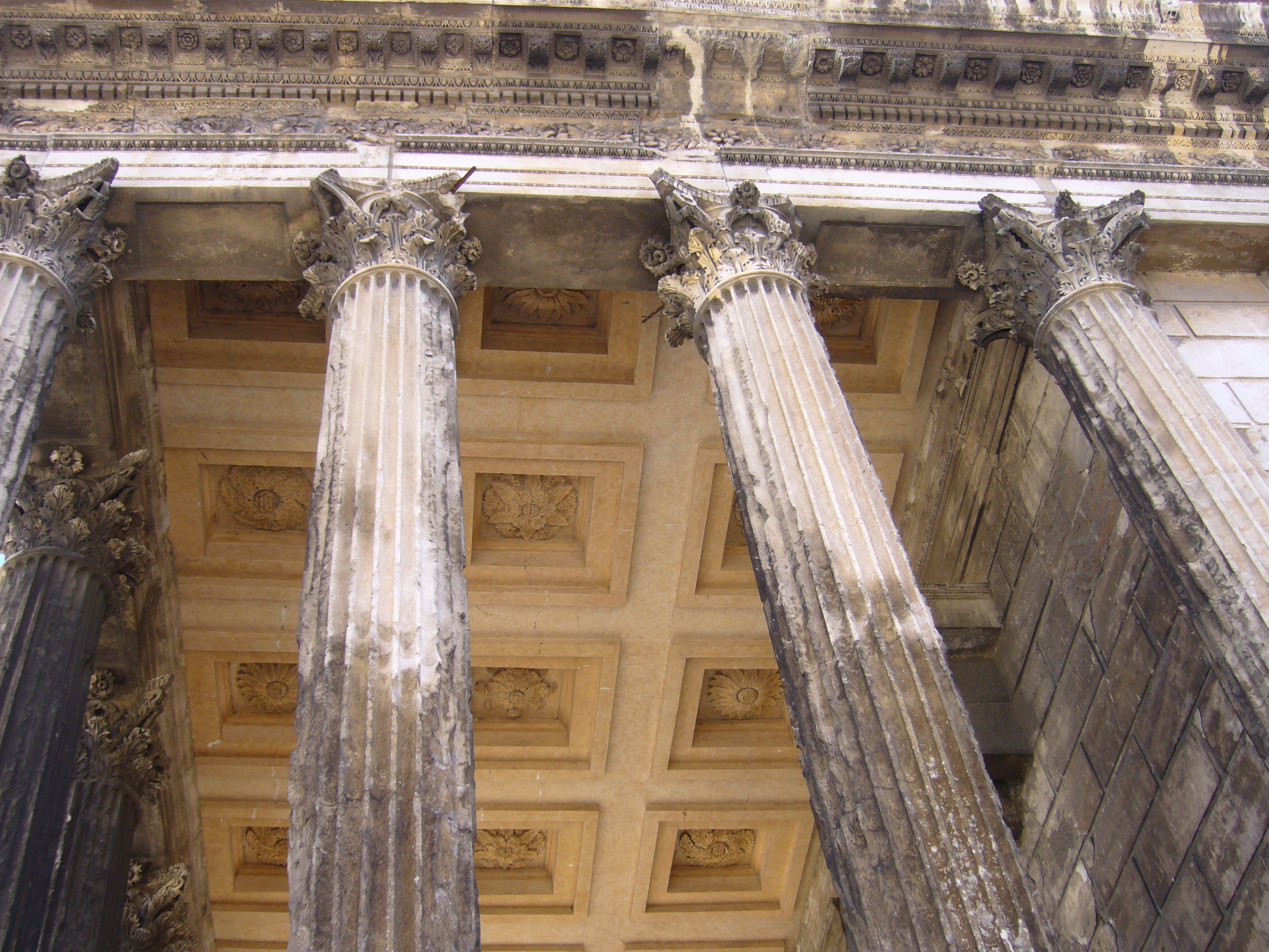 Colonnes et plafond de la Maison Carrée à Nîmes.